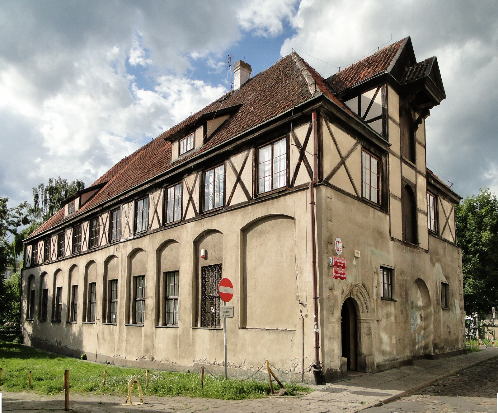 Stajnia Zamkowa (Książęca) w Szczecinie (zabytek nr rejestr. 30)